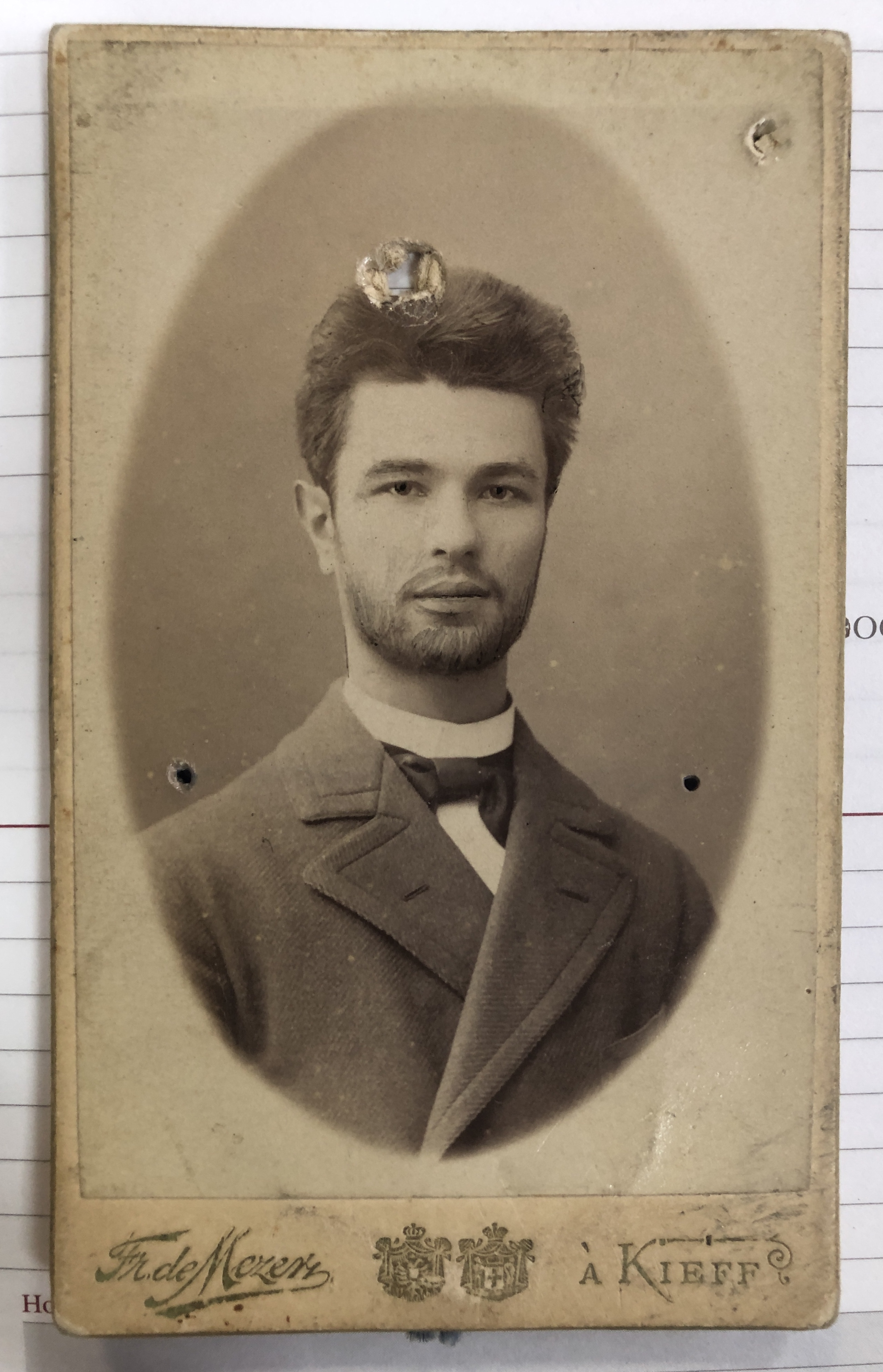 Фото з особистої справи студента університета св Володимира, що зберігається в ДАК